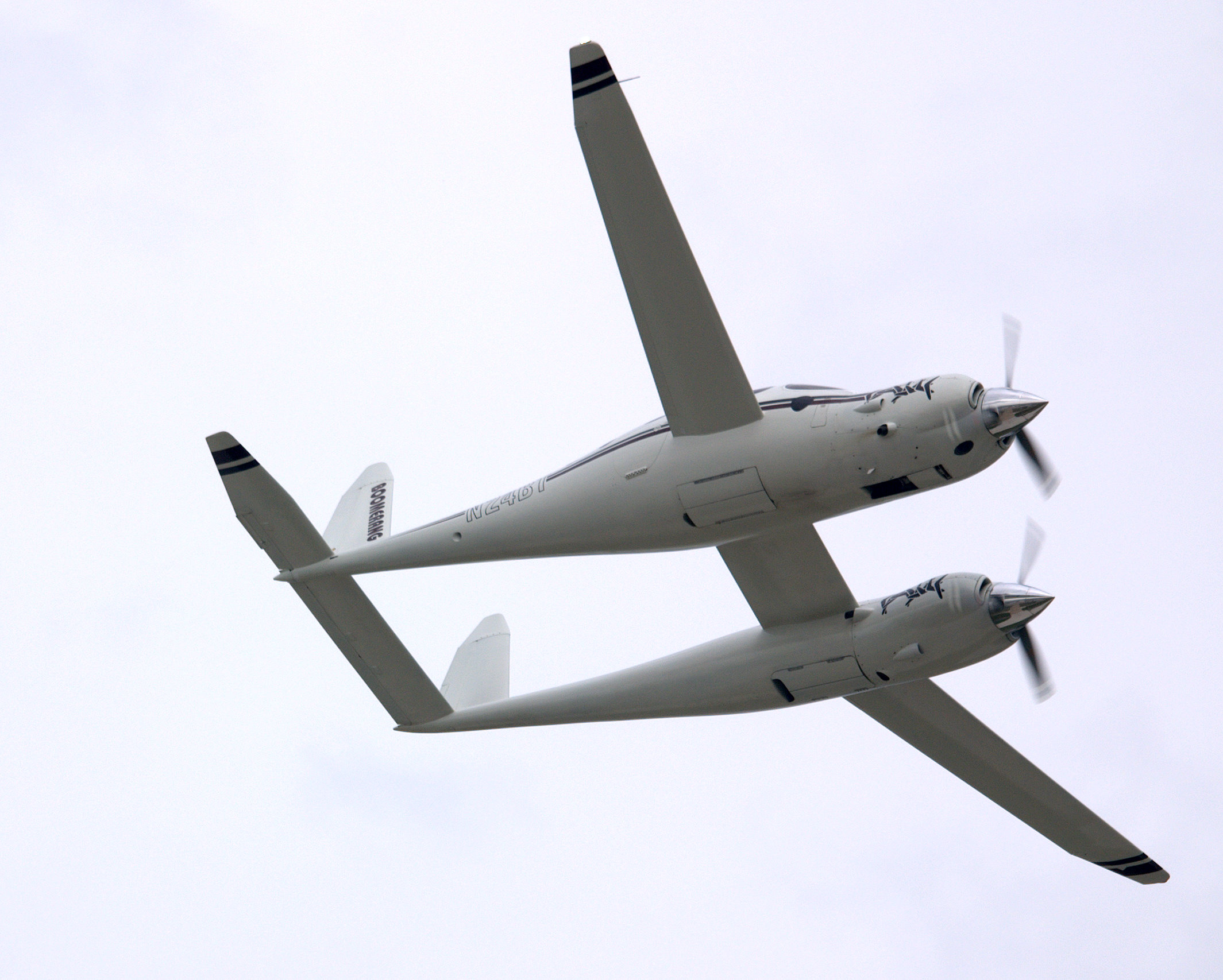 AirVenture 2011, Oshkosh WI